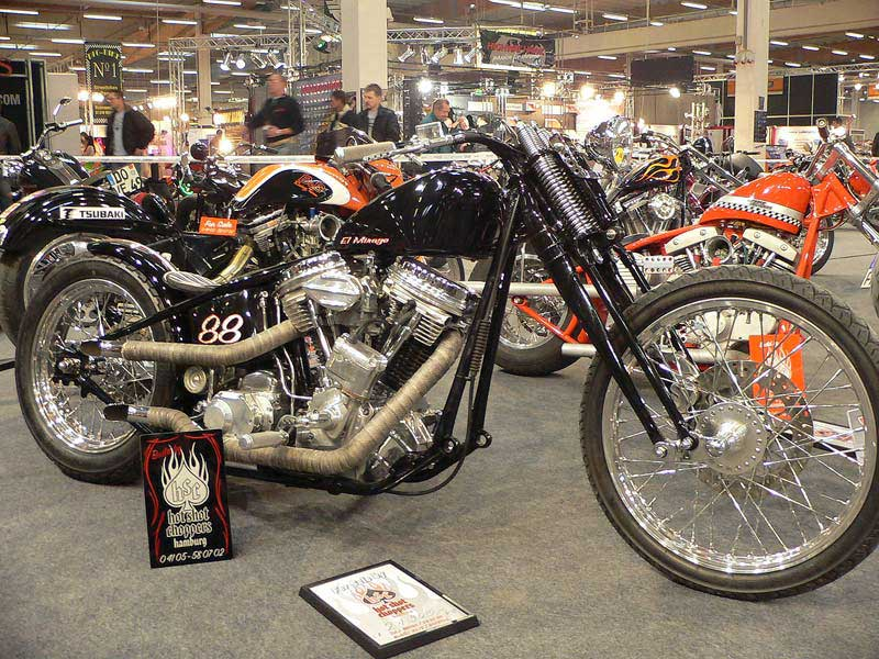 Bobber der Fa. Hot Shot Choppers